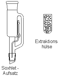 Darstellung eines Soxhlet-Aufsatzes mit Extraktionshülse